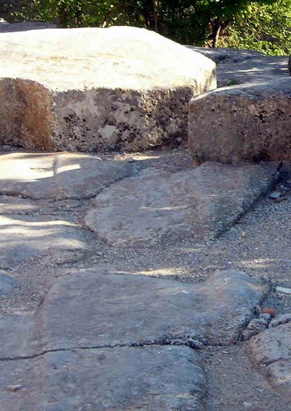 Site archéologique romain d'Alba-la-Romaine, Ardèche, France.